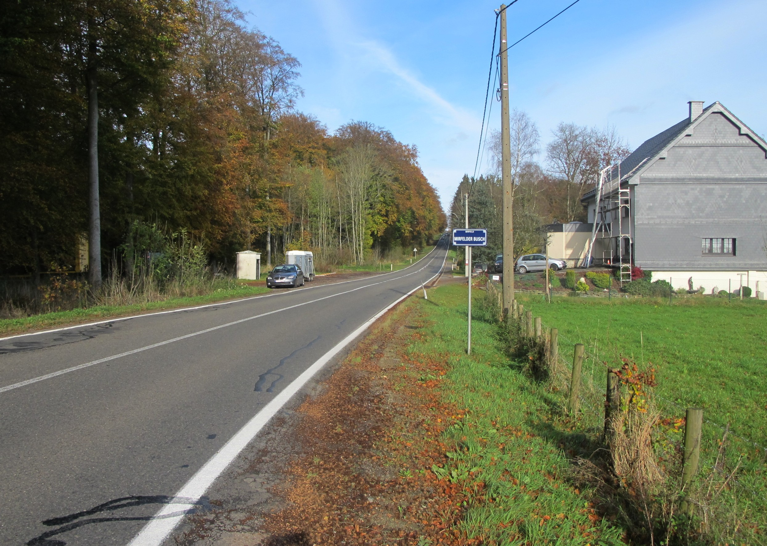 Mirfelderbusch bei Amel, Belgien